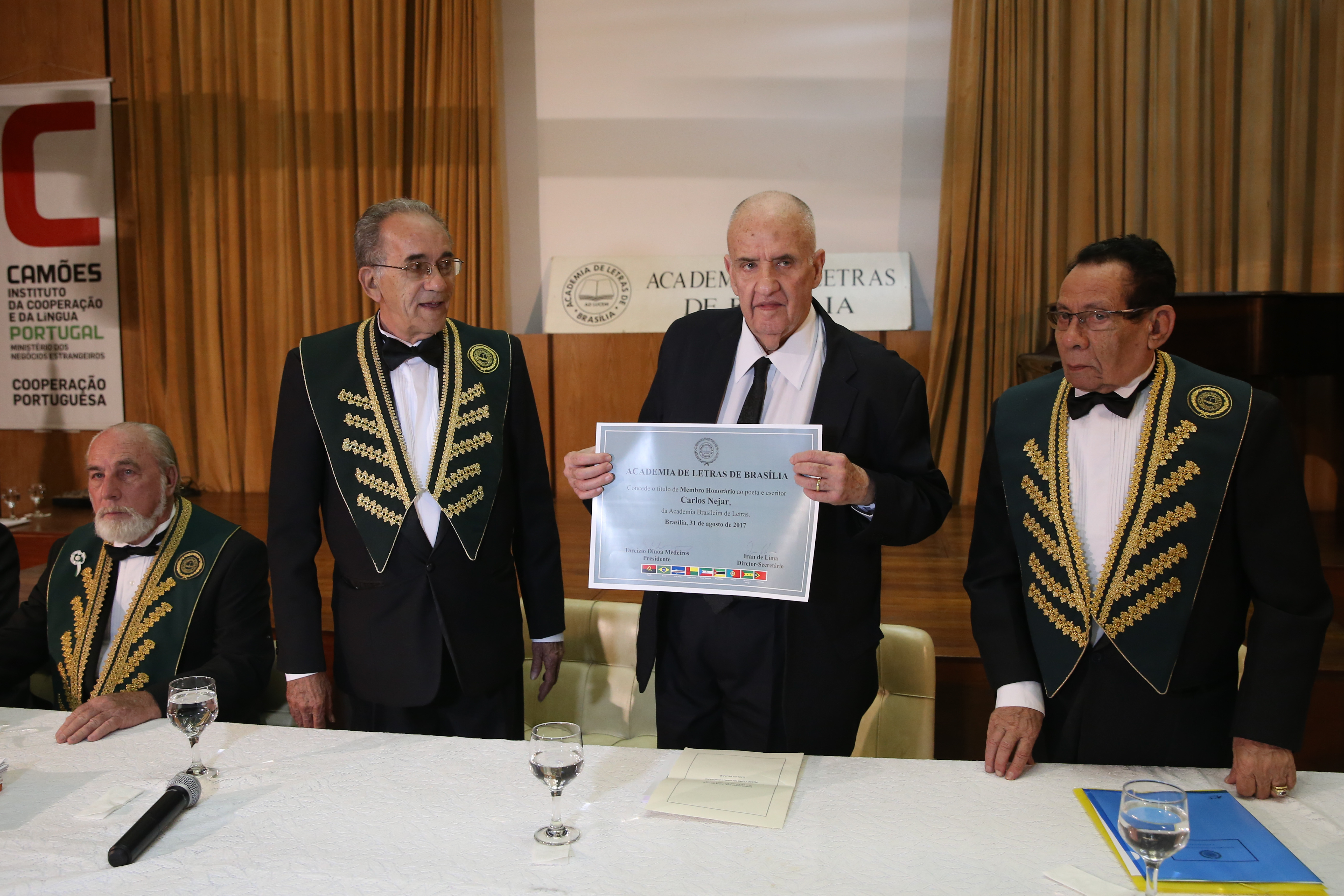 Brasília - O poeta Carlos Nejar é homenageado pela Academia de Letras de Brasília (ACLEB) em um evento na Embaixada de Portugal. E/D: presidente da ABL, José Carlos Gentili; presidente da ACLEB, Tarcízio Dinoá Medeiros; o poeta Carlos Nejar; e o presidente do Clube dos Pioneiros, Roosevelt Dias Beltrão (Valter Campanato/Agência Brasil)